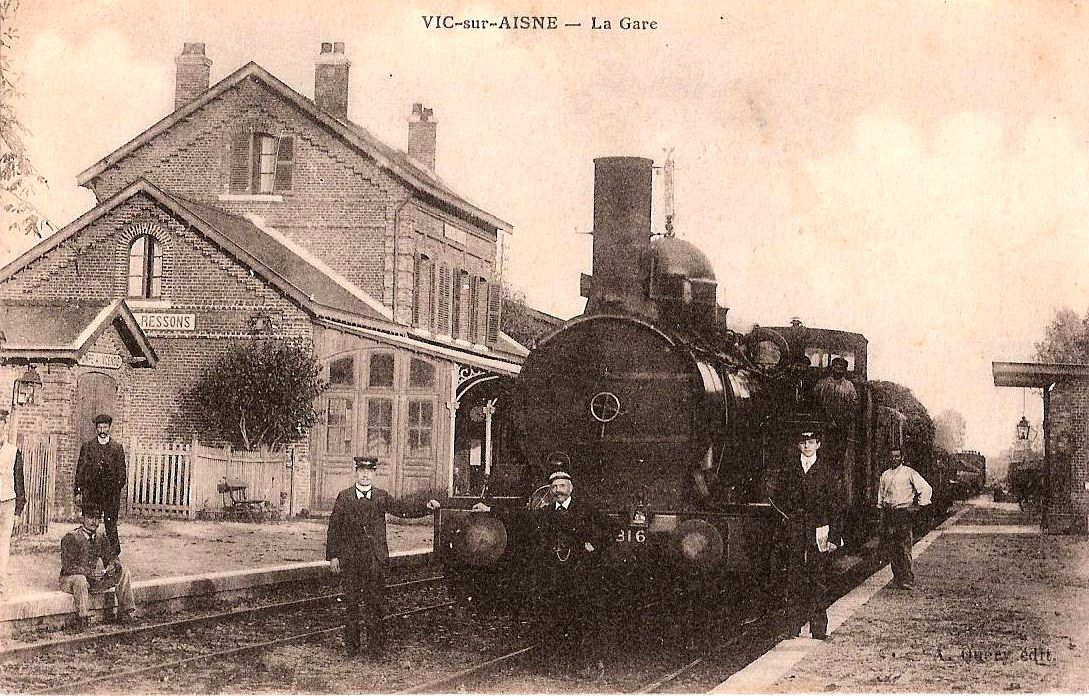 Train de marchandises stationnant en gare.